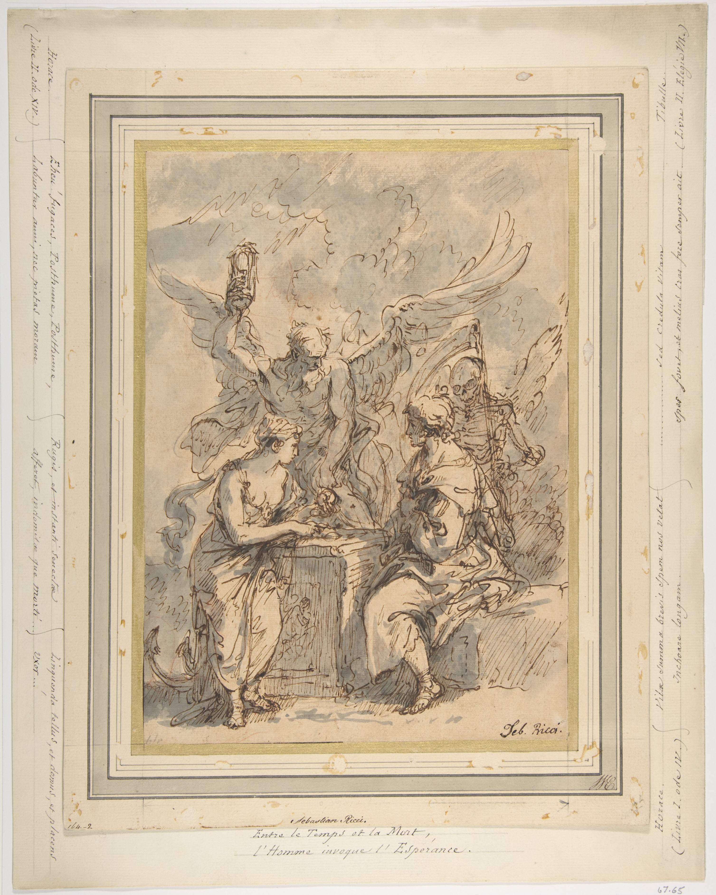 Drawing; Drawings